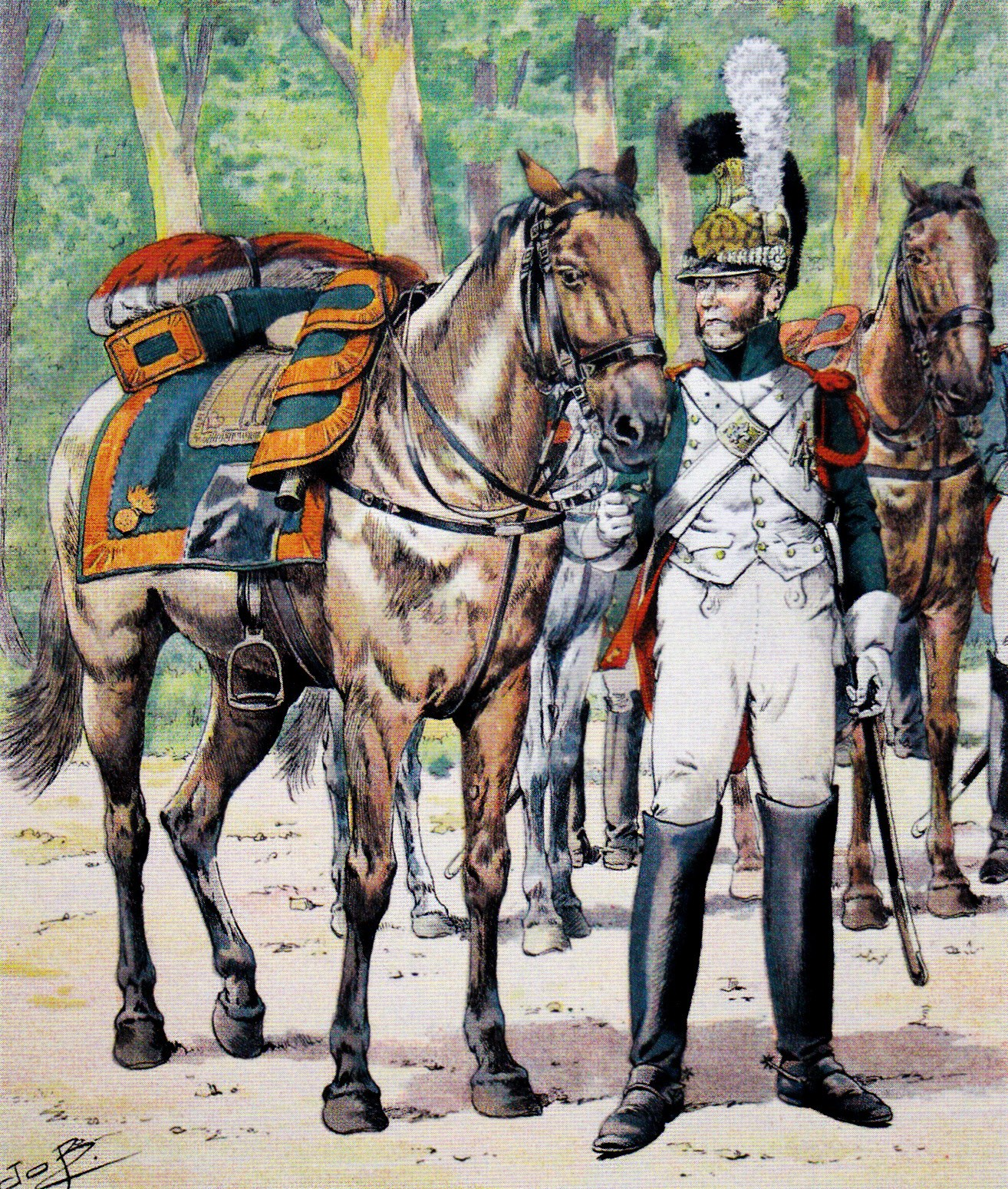 Cavalier du Corps royal des dragons de France. Cette unité, créée sous la Première Restauration, est issue du régiment de dragons de la Garde impériale. Son uniforme est presque identique à celui porté sous l'Empire, à l'exception notable du casque à chenille noire et plumet blanc, aux caractéristiques des dragons de la ligne. L'aiguillette est à gauche : « erreur du peintre ou volonté du corps ? » s'interrogent Prévost et Bourgeot.